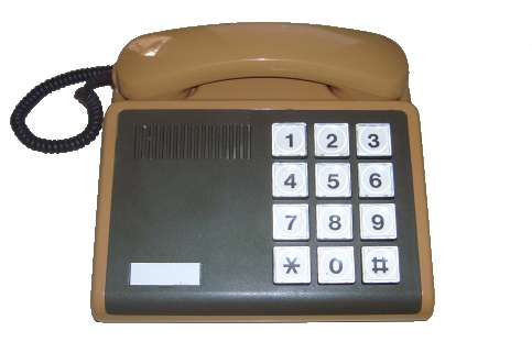 D FeAp 321 - Hamburg